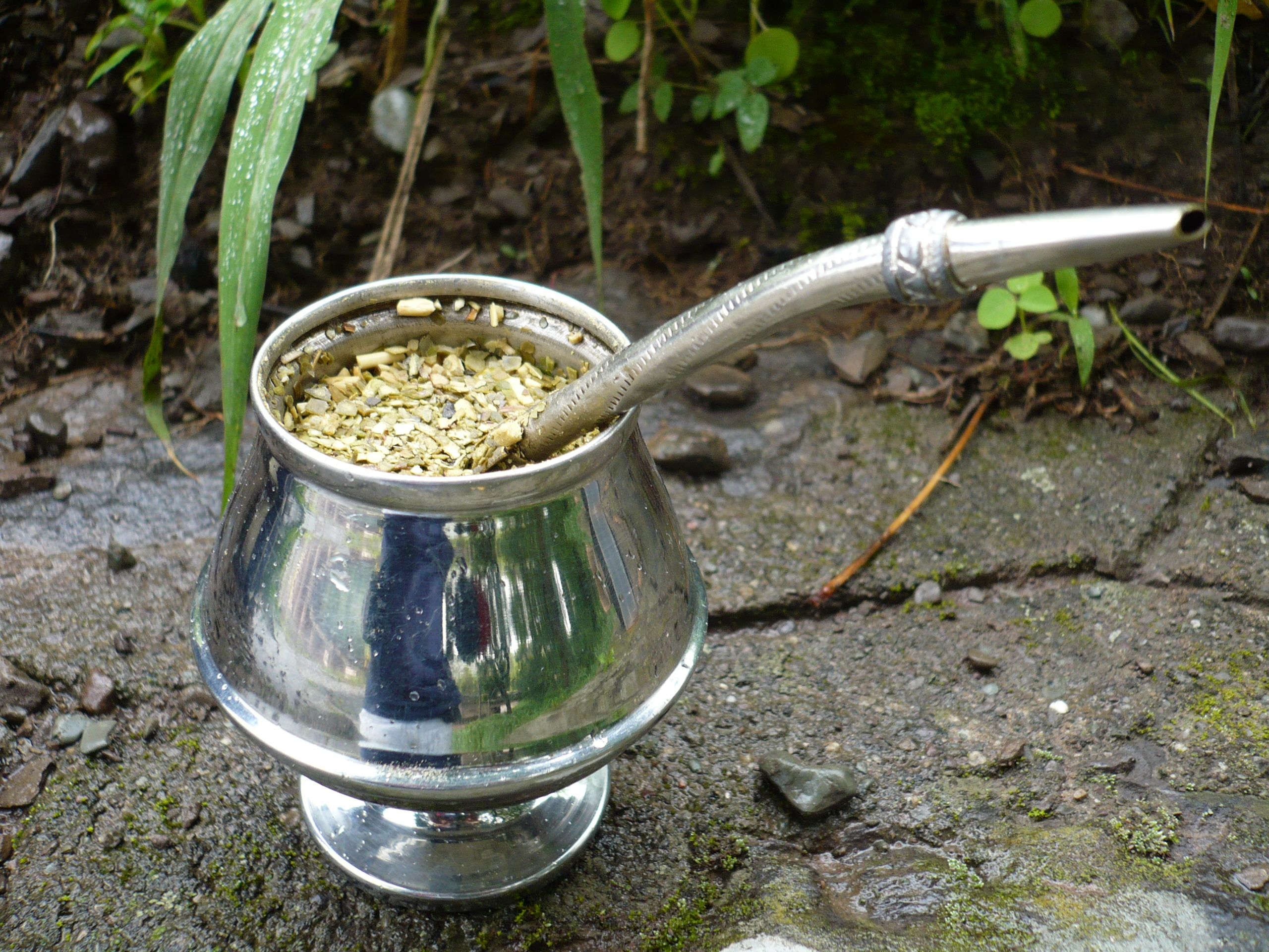 Mate de alpaca o tal ves plata